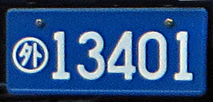 Japan diplomatic license plate (外)13401.